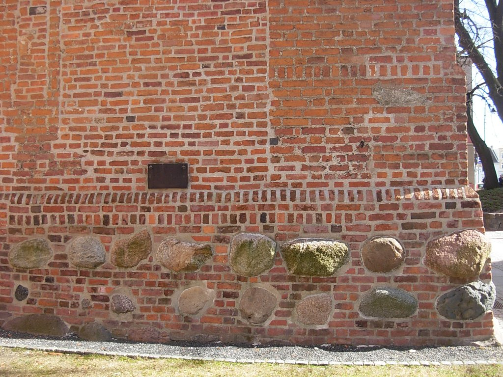 Katedra w Bydgoszczy. Tzw "kamienie chlebowe" w murze dzwonnicy, dostawionej do świątyni od południa.